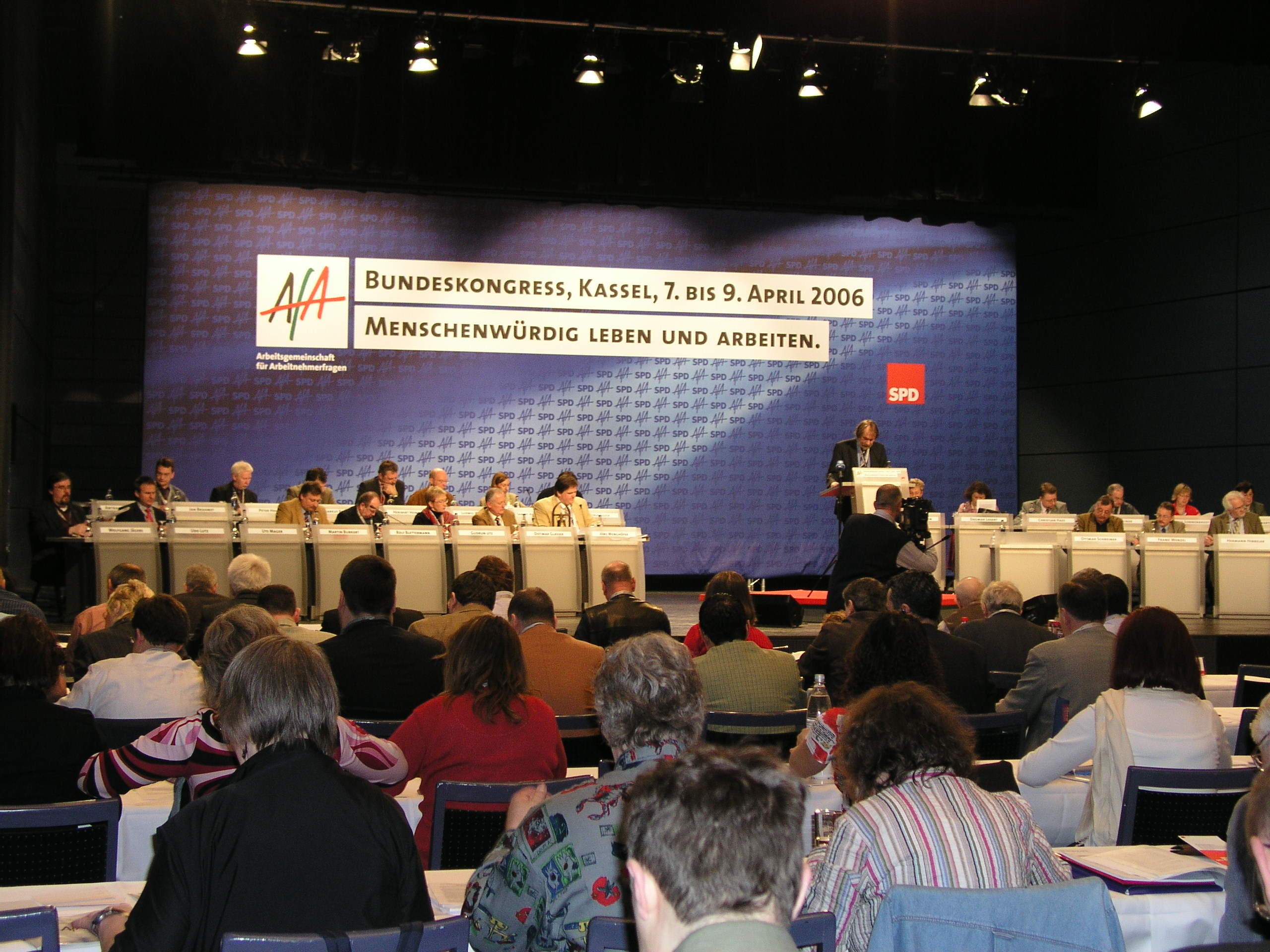 AfA Bundeskonferenz 2006, Kassel (Germany)